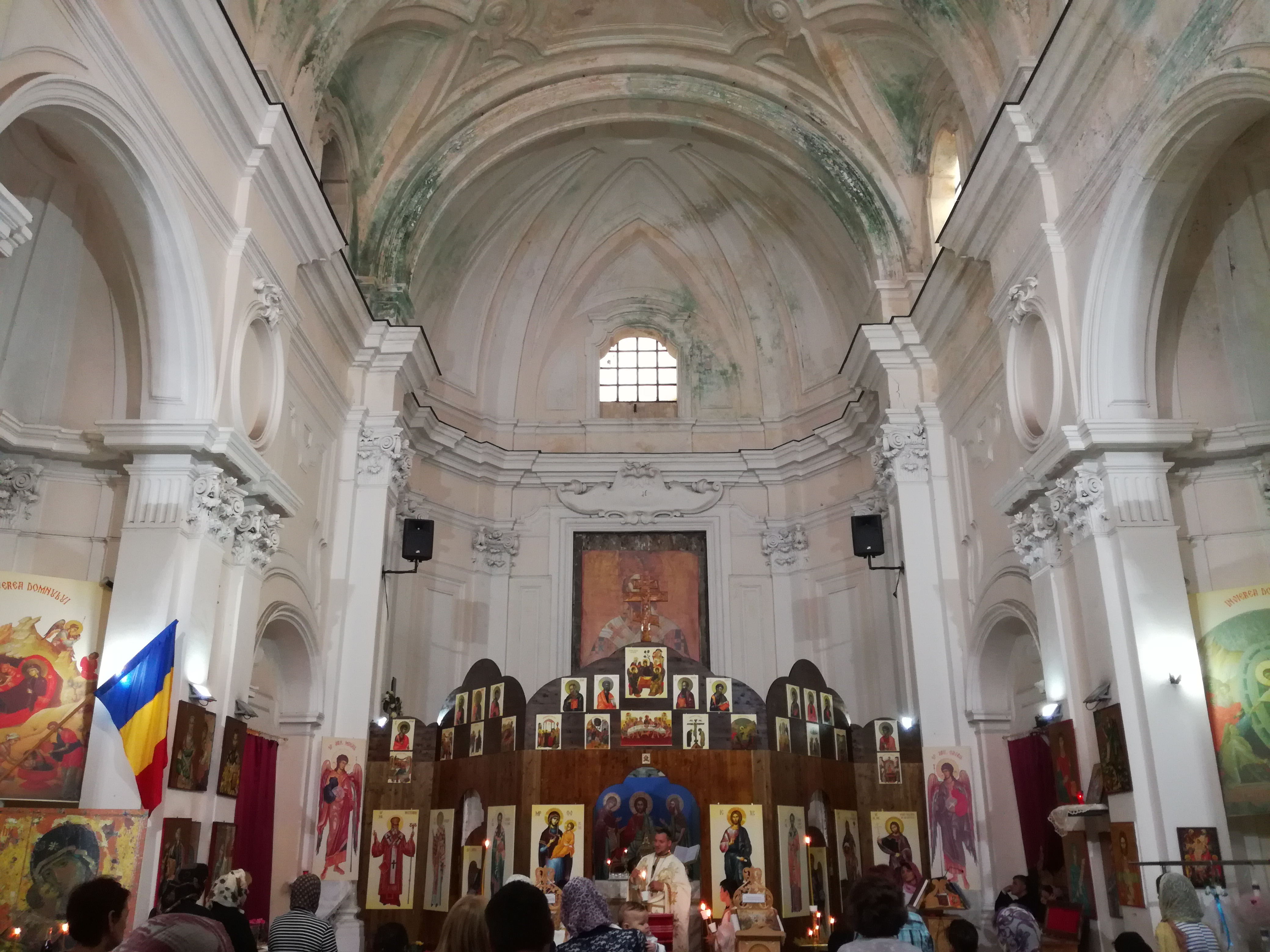 Interno Marco e Andrea a Nilo